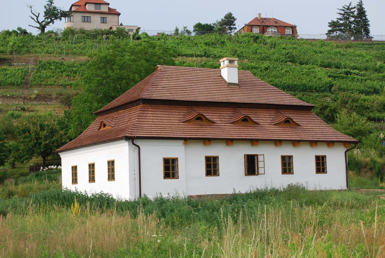 Viniční dům v Praze-Modřanech. Viniční dům čp. 6 se nachází pod bývalými Modřanskými vinicemi v dnešní ulici Chuchelská. První zmínky pocházejí z darovací listiny Soběslava II. z roku 1178. 50°0'39.108"N, 14°24'12.532"E